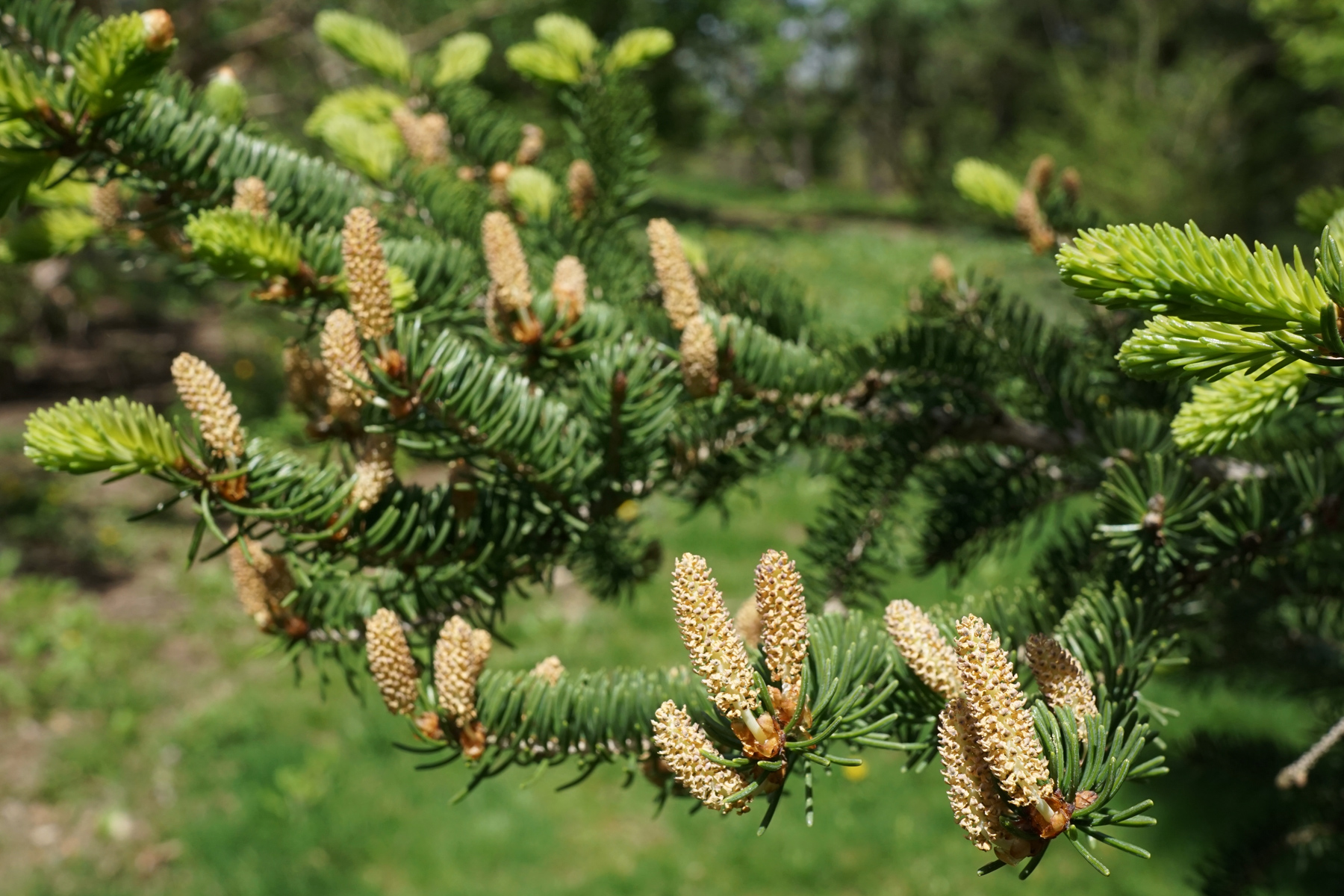 Picea wilsonii (Wilson Spruce)